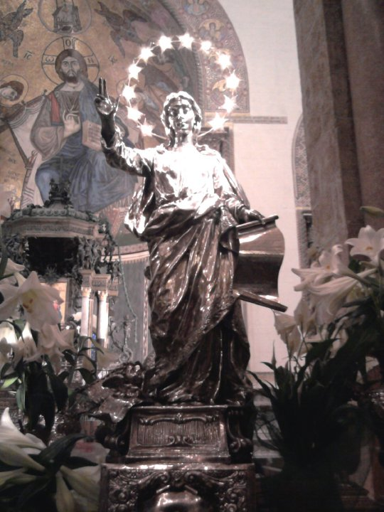 La statua argentea di Lio Gangeri all'interno del duomo a pochi minuti dalla processione